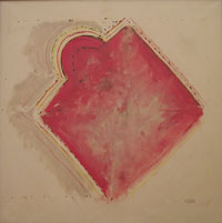 Hibrid (Hybrid), Öl auf Leinwand 1000x900mm